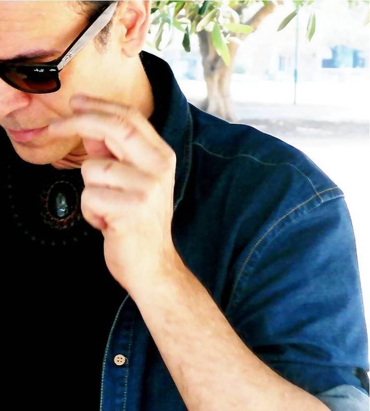 ראובן ארז